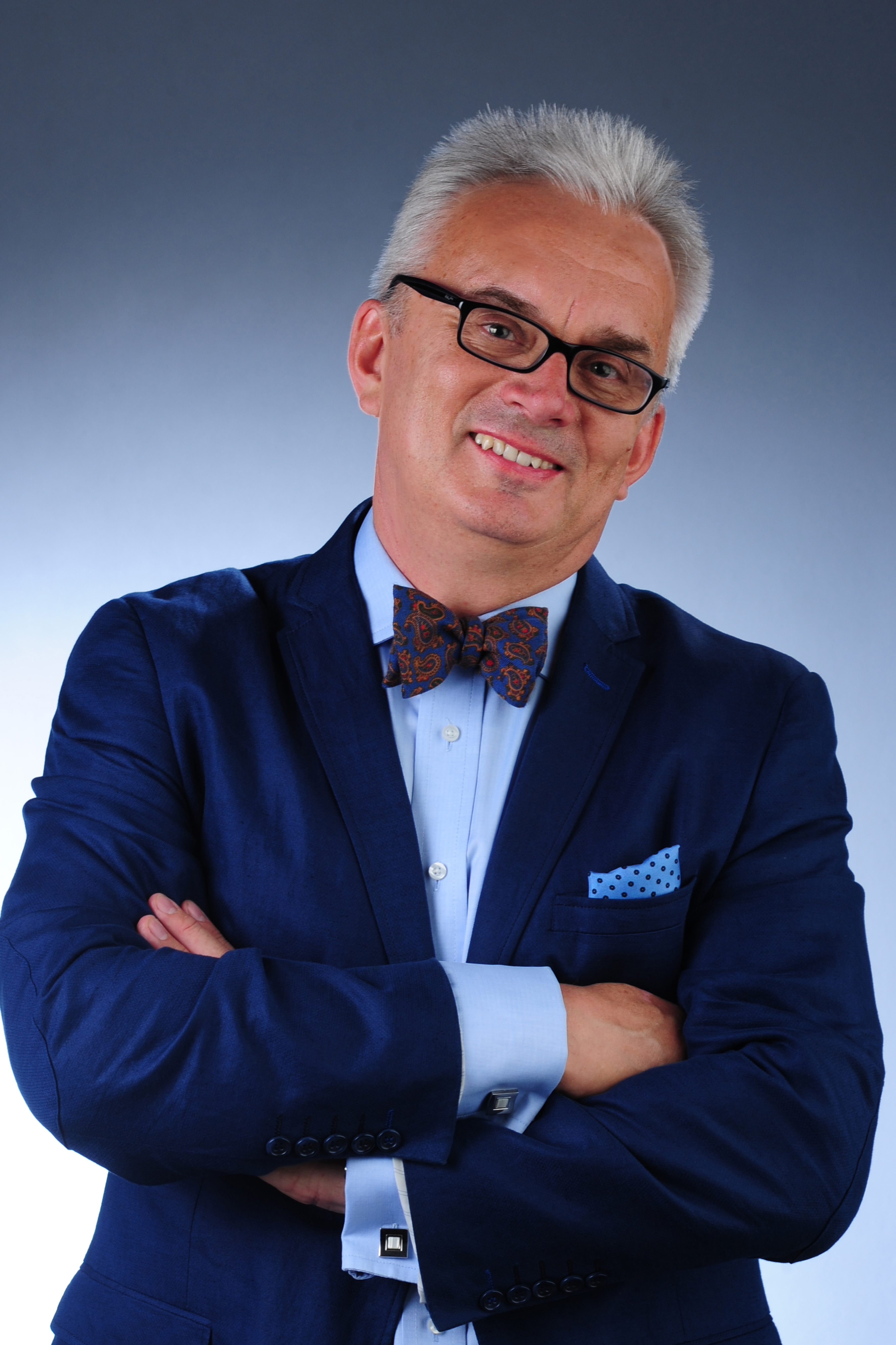 Profesor Tomasz Woźniak